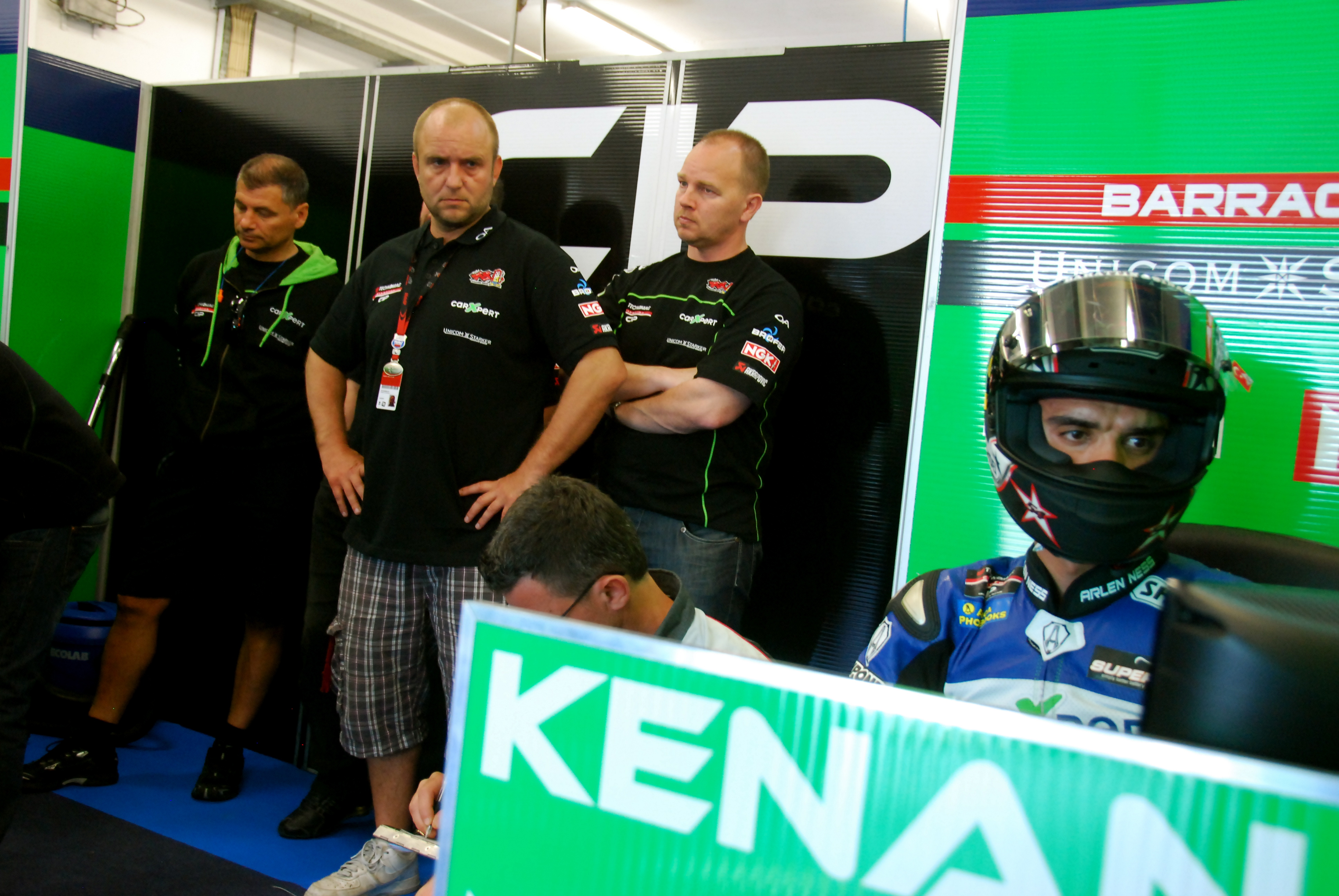 Le pilote turc Kenan Sofuoğlu, dans le stand du team Technomag-CIP, lors du GP du Portugal, à Estoril.